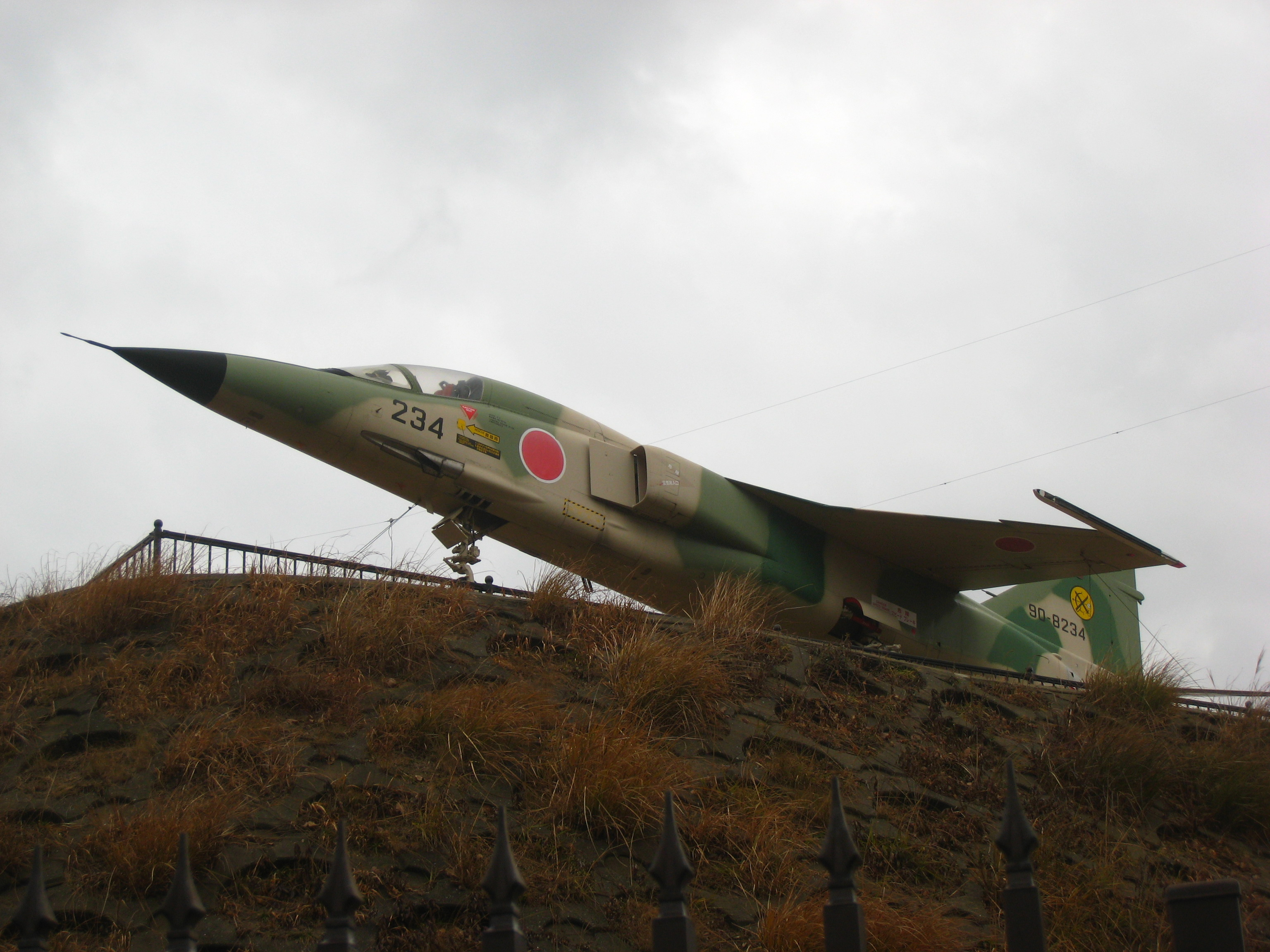 春日基地に屋外展示されているF－1。